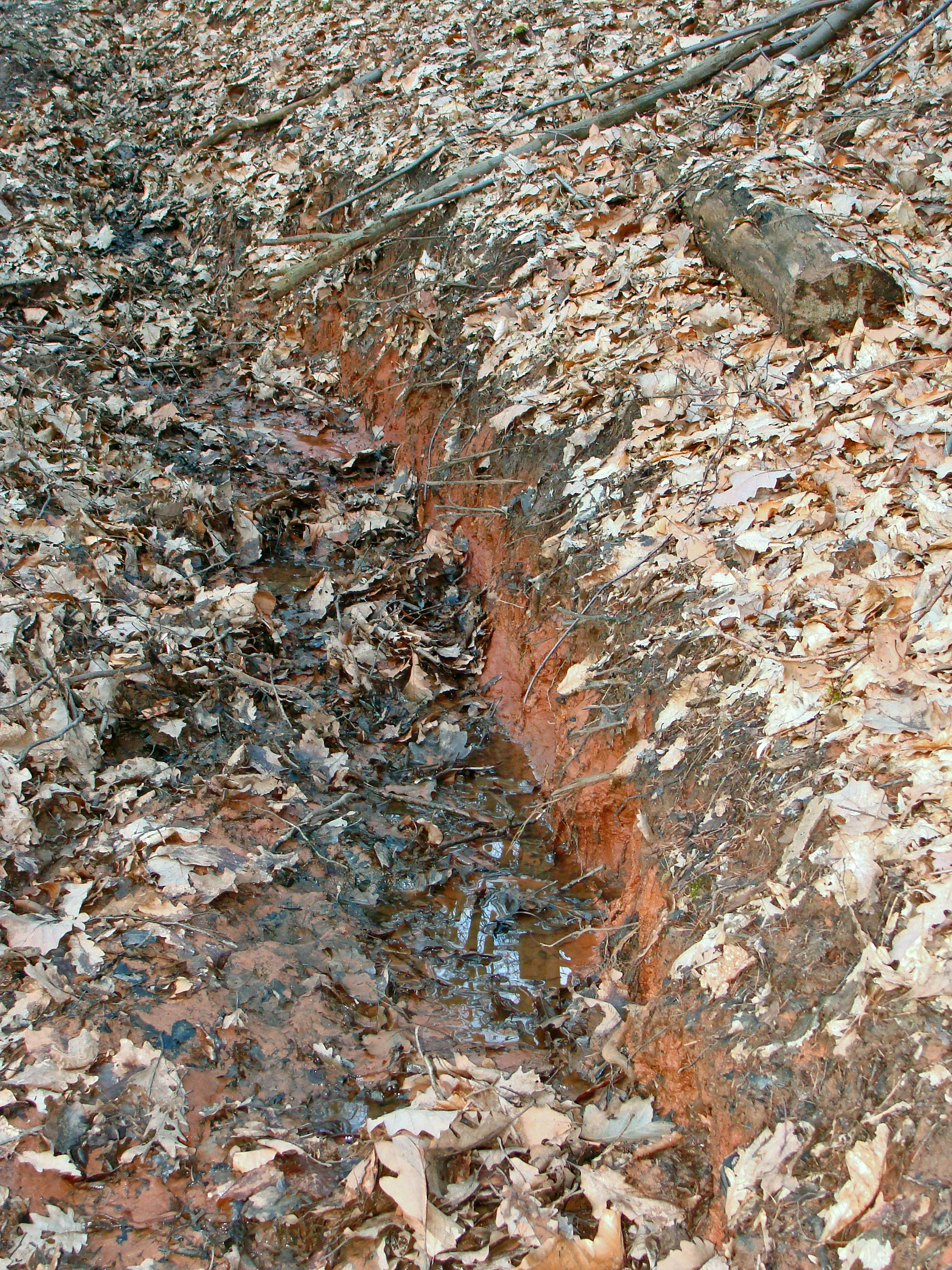 Source du Doerrenbach (ruisseau) ou Dörrbach photographié dans la forêt de Karlsbrunn (Völklingen) avant la frontière à hauteur de la carrière du Barrois (Freyming-Merlebach) le 2 mars 2014.